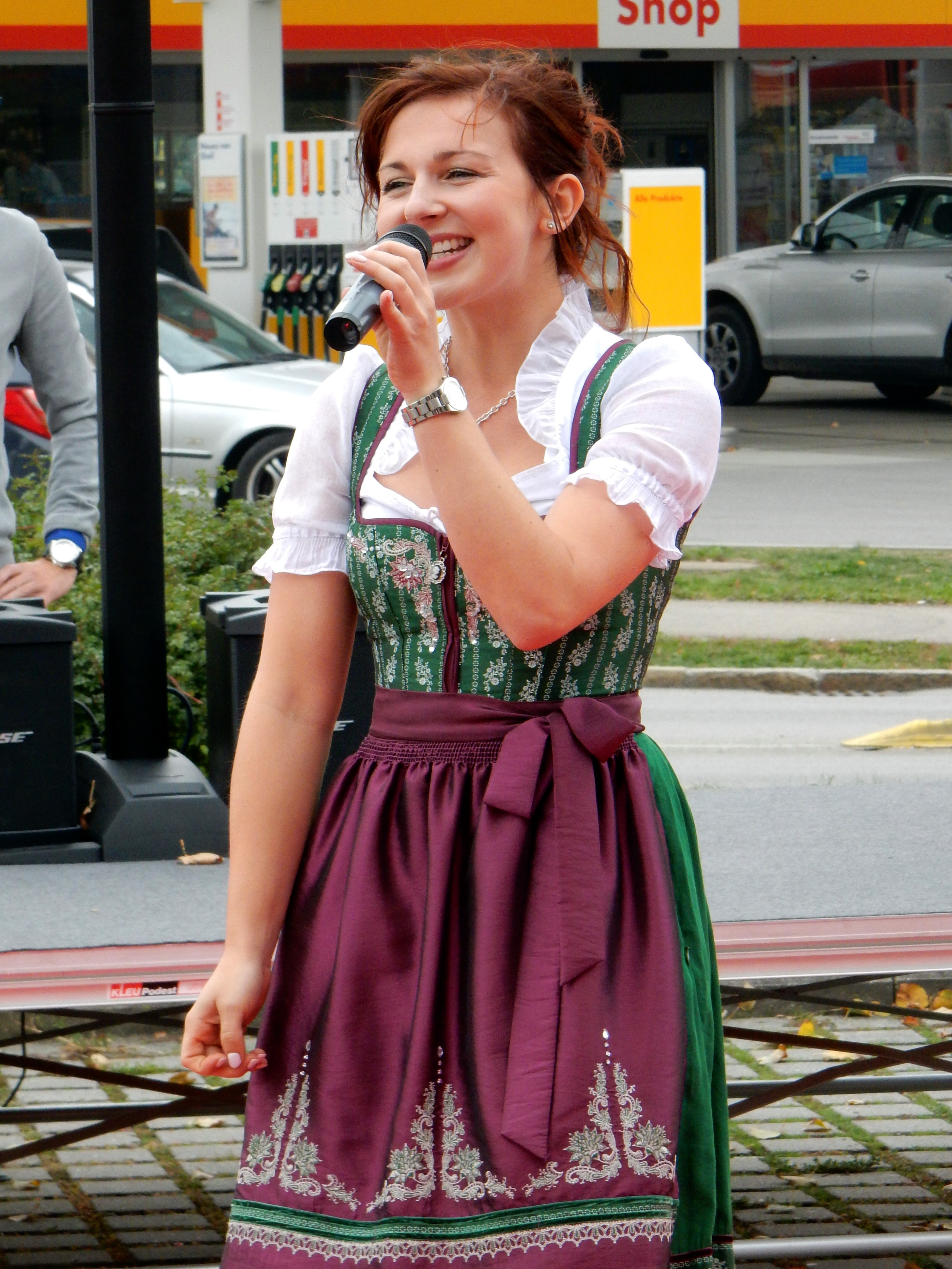 Romy am 04.10.15 live in Pocking